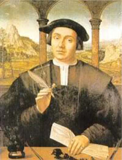 Retrato de Luis de Santángel (m. 1498), conservado en el Museo Naval de Madrid.